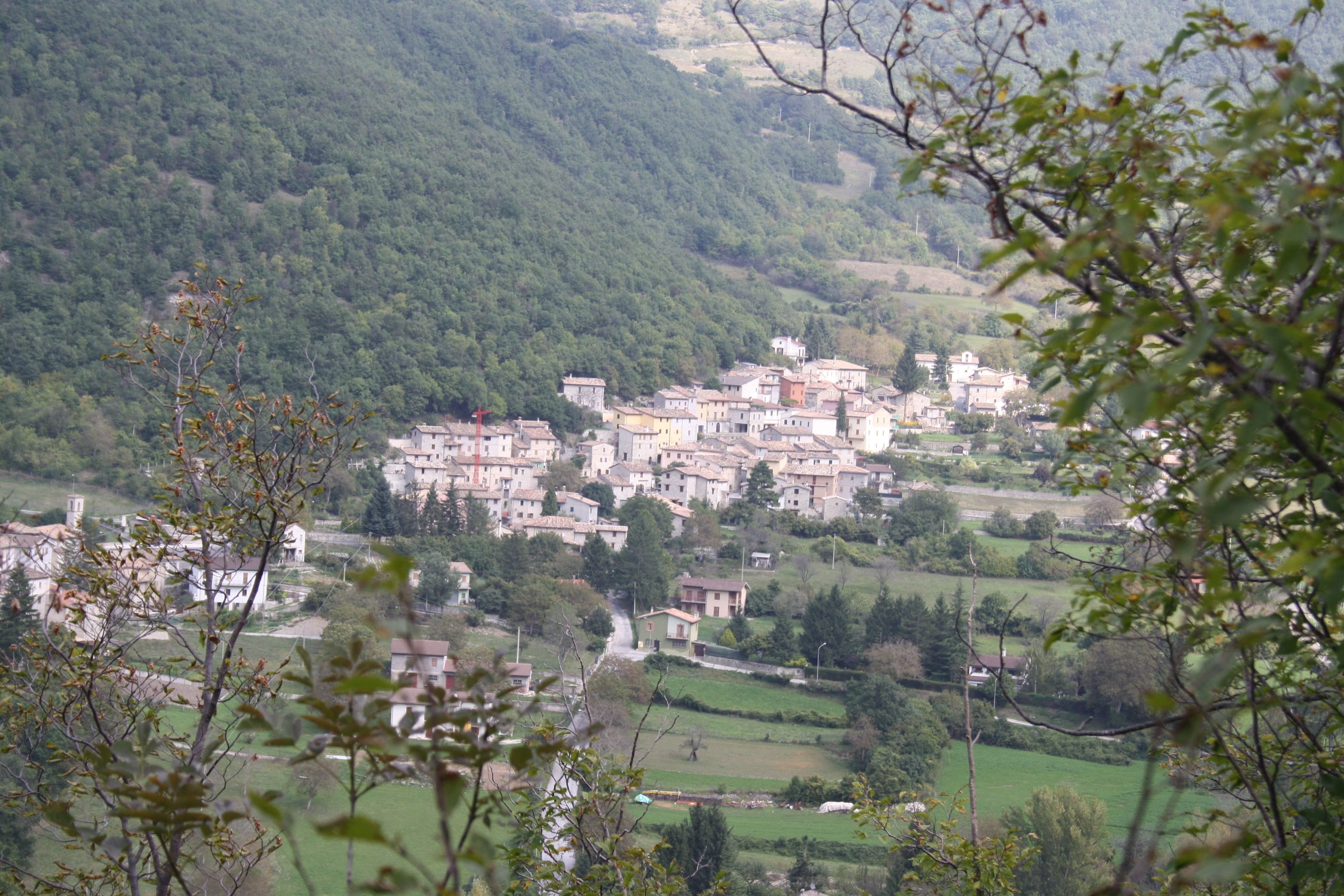 Vista del paese